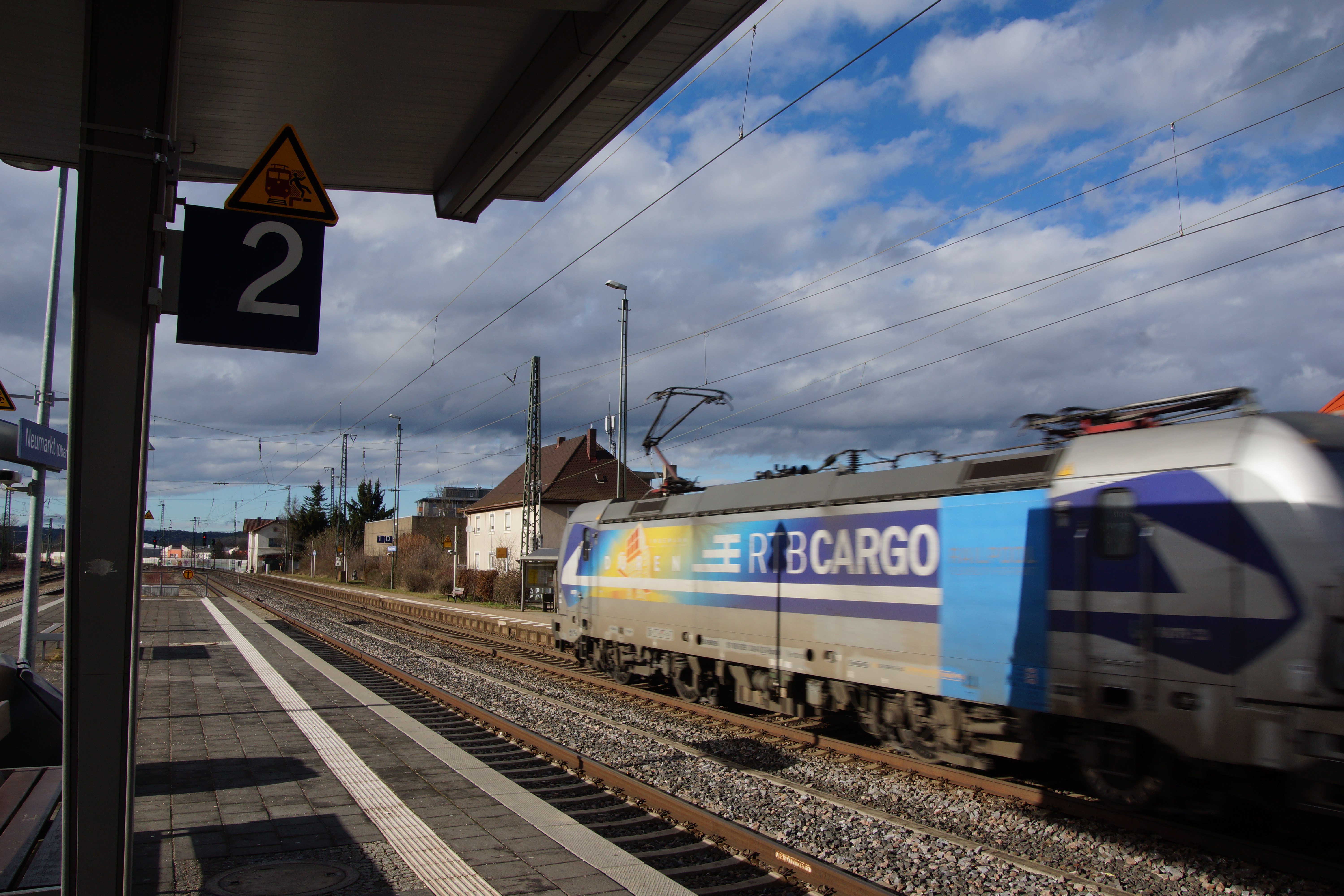 Neumarkt Oberpfalz - Bahnhof